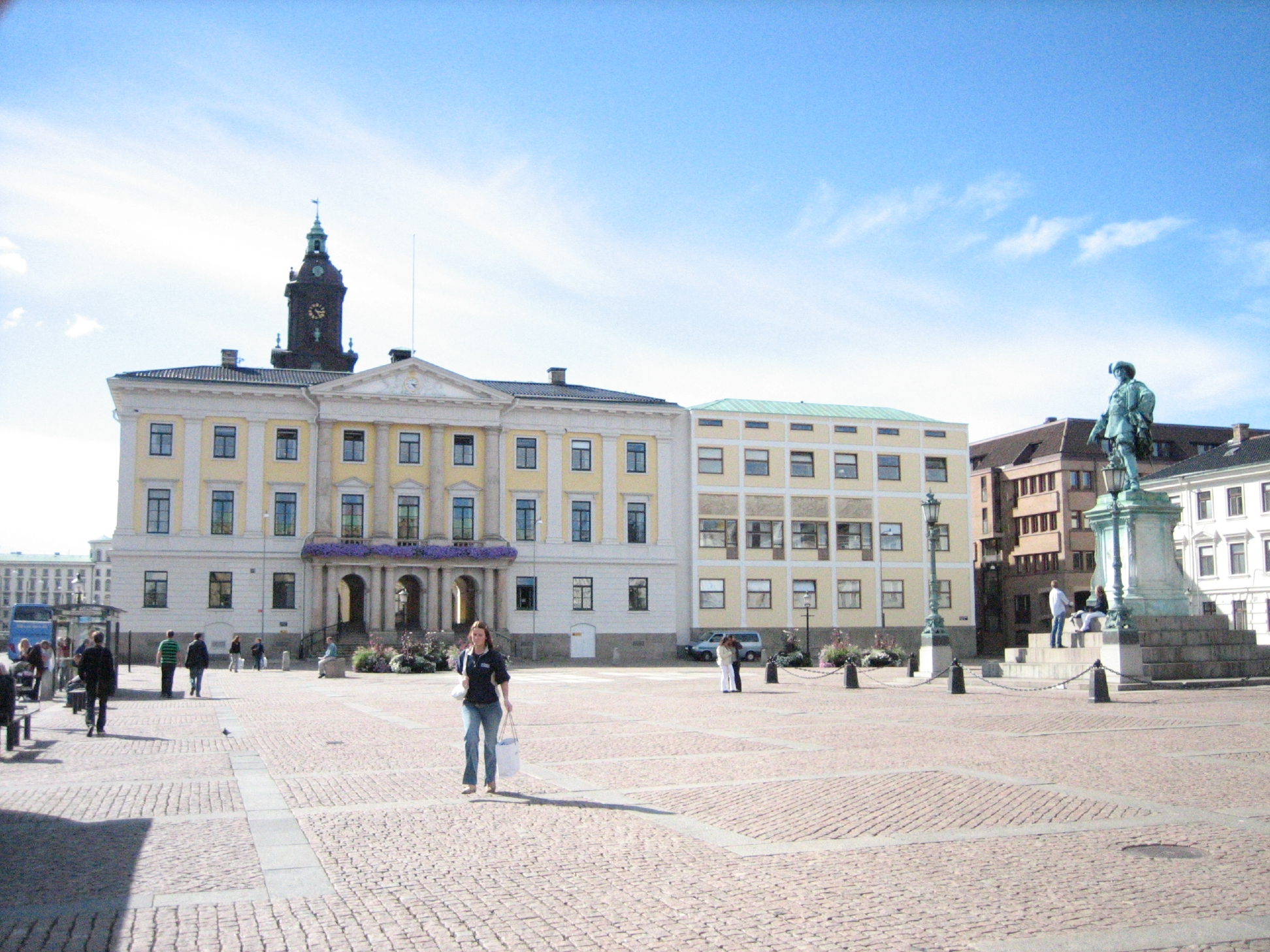 Gustav II Adolfs Torg, Göteborg